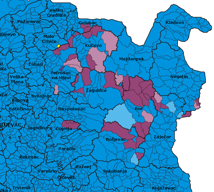 Етничка мапа Србије - попис из 2002 - подаци по насељима. Оригинални извор слике